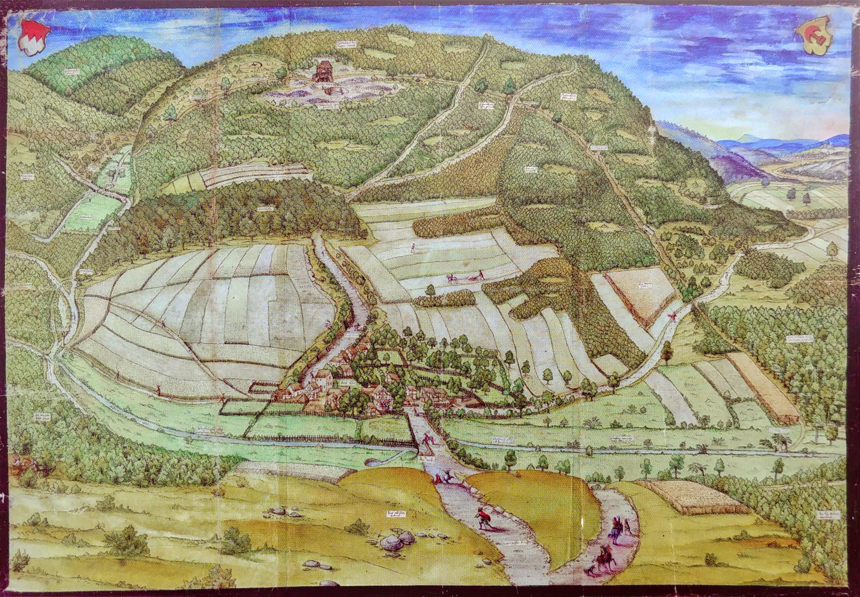 Grube Silbersegen. Darstellung von 1544. Zu sehen sind im Vordergrund der Ort Espa, dahinter der Silberberg (Gaulskopf). Auf dem Berg sind die Tagesanlagen der Grube Silbersegen sichtbar. Das Schachthaus markiert die Position des Gerichtschachts. Die Gemarkungsgrenze zwischen Espa und Cleeberg ist als schmaler Weg eingezeichnet und verläuft von rechts unten über den Bergrücken, direkt am Gerichtschacht vorbei und weiter nach links.